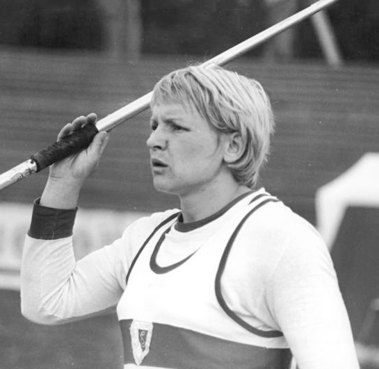 Ruth Fuchs ADN-ZB Libers-29.04.1980 Split: Einen neuen Weltrekord im Speerwurf stellte die zweimalige DDR-Olympiasiegerin Ruth Fuchs, hier bei einem früheren Wettkampf, in Split auf. Die 33jährige kam auf 69,96 m und verbesserte ihre alte Rekordmarke um 44 cm.